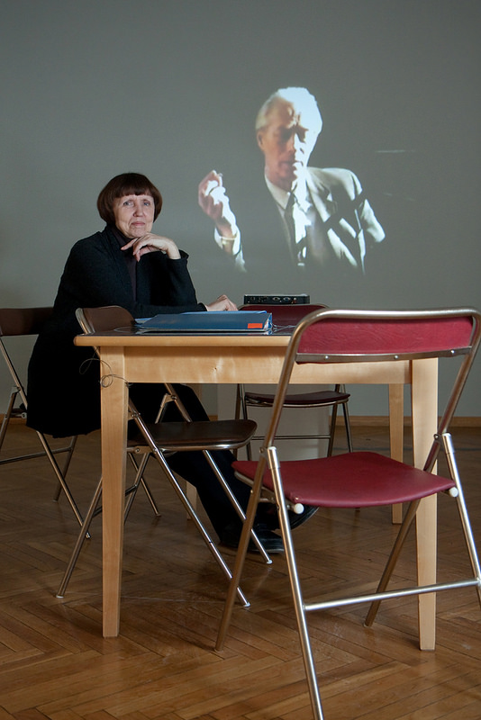 Kunstiteadlane Tiiu Talvistu 2013. aastal Tartus, Endel Kõksi näitusel.